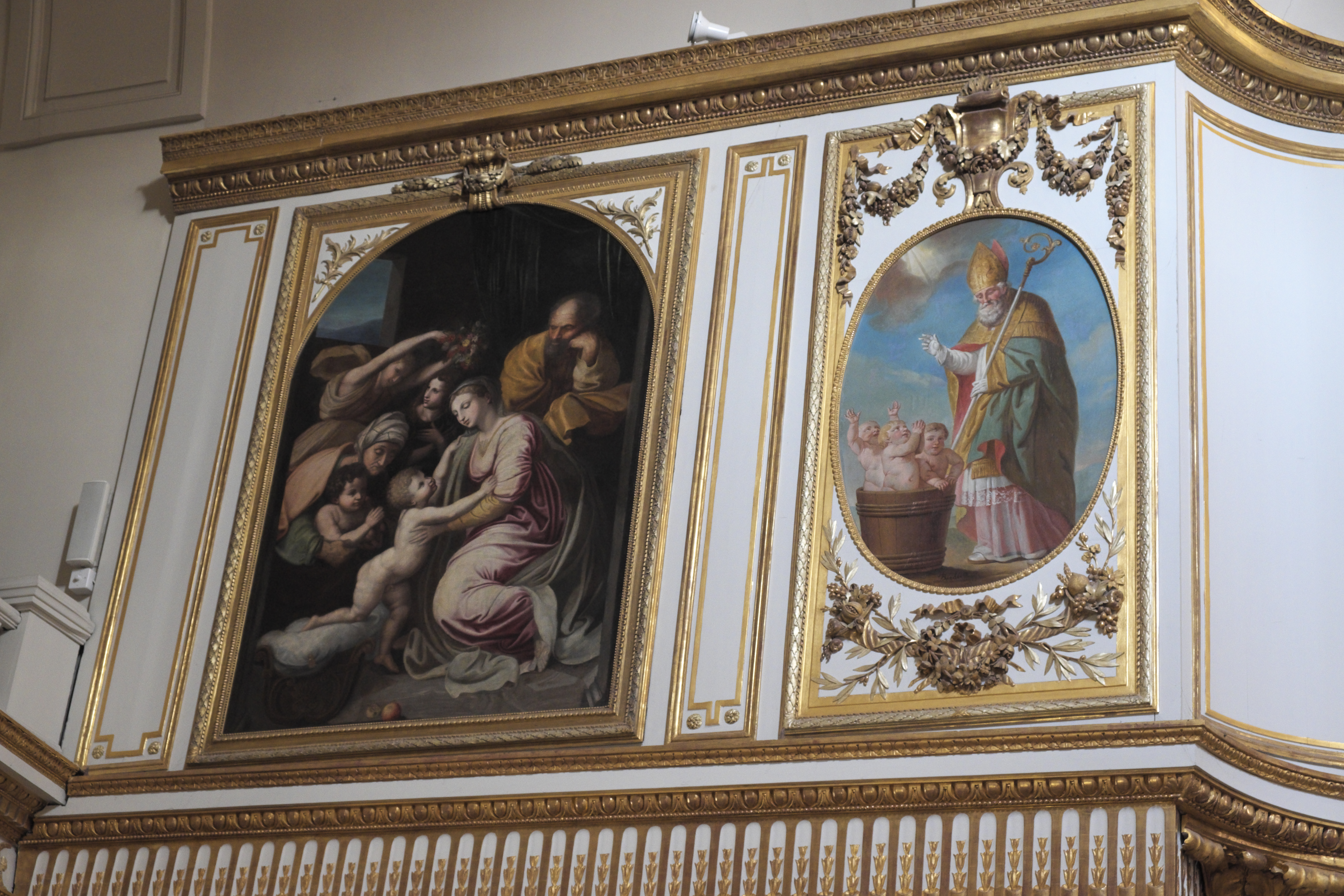 Katholische Pfarrkirche Saint-Médard in Brunoy im Département Essonne (Île-de-France/Frankreich), Holztäfelung mit Gemälden, Darstellung: Maria, Jesuskind, Johannes der Täufer und Elisabeth (links), heiliger Nikolaus und die drei Scholaren im Holzfass (rechts)